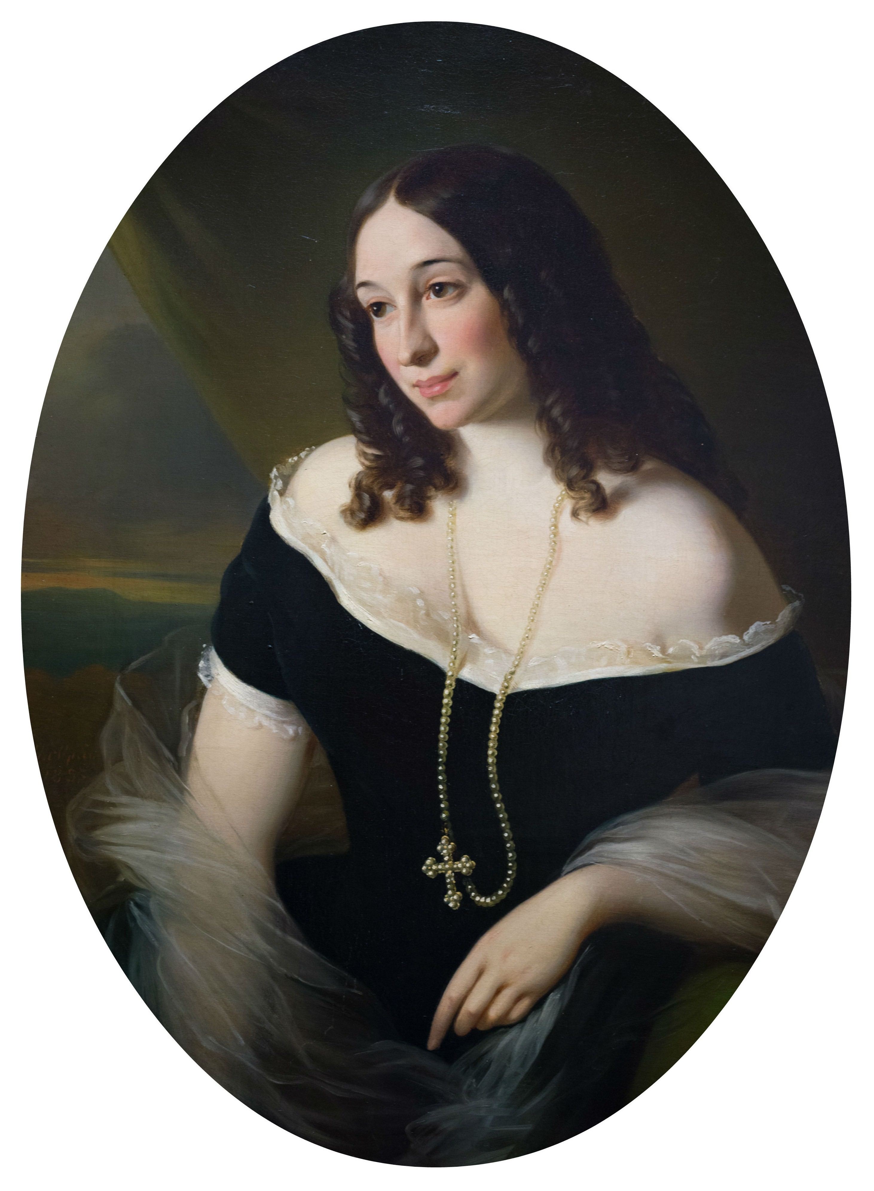 Дарья Порфирьевна Сипягина, урожденная Красовская (1835—1877), во второй браке за егермейстером князем Василием Васильевичем Мещерским.